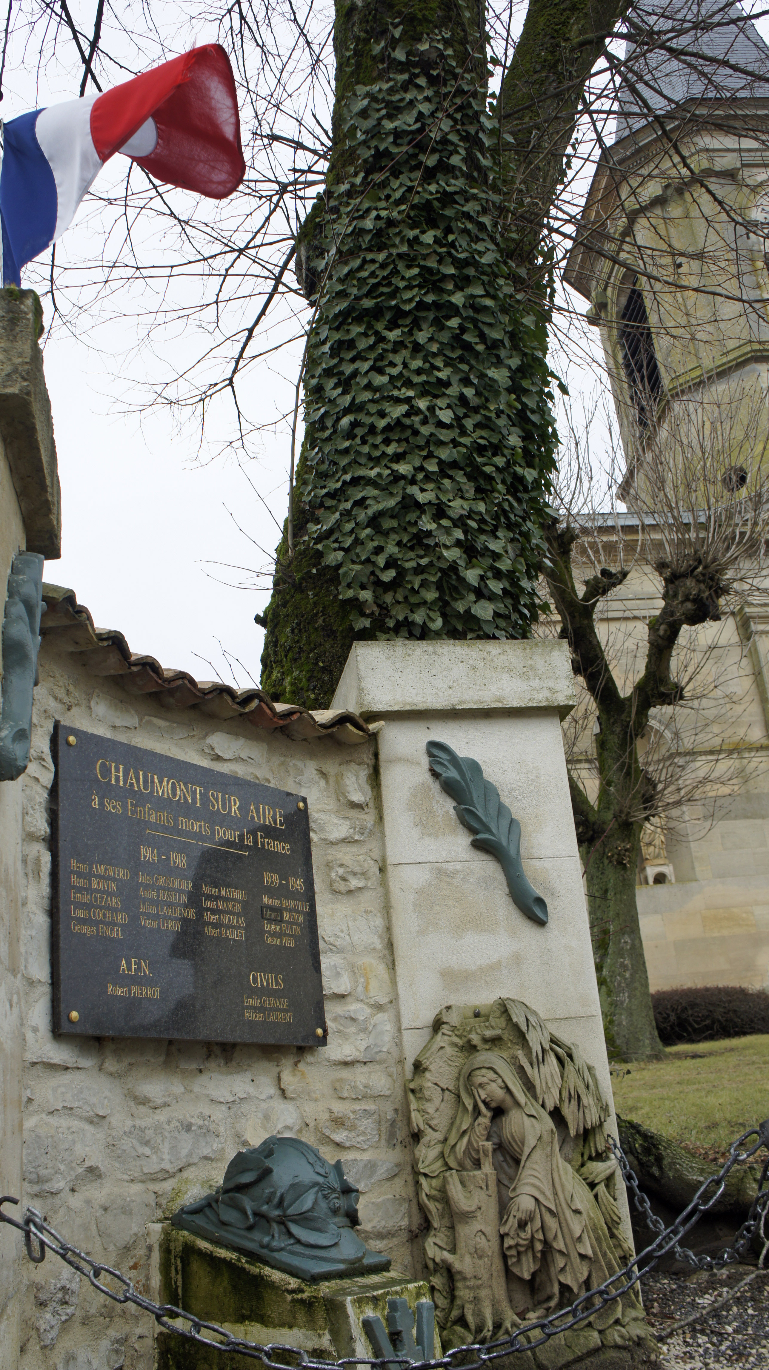 Monument aux morts de Chaumont sur Aires.